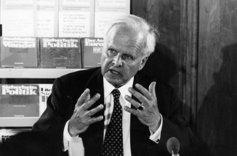 Carl Friedrich v. Weizsäcker Carl Friedrich Freiherr v. Weizsäcker 1963 [Porträt Carl Friedrich von Weizsäcker (auf einer Veranstaltung beim Bundesamt für zivilen Bevölkerungsschutz (BzB)?)] Abgebildete Personen: Weizsäcker, Carl Friedrich von Freiherr Prof.: Physiker, Philosoph, Direktor des Max-Planck-Institutes, Bundesrepublik Deutschland (GND 118630717)